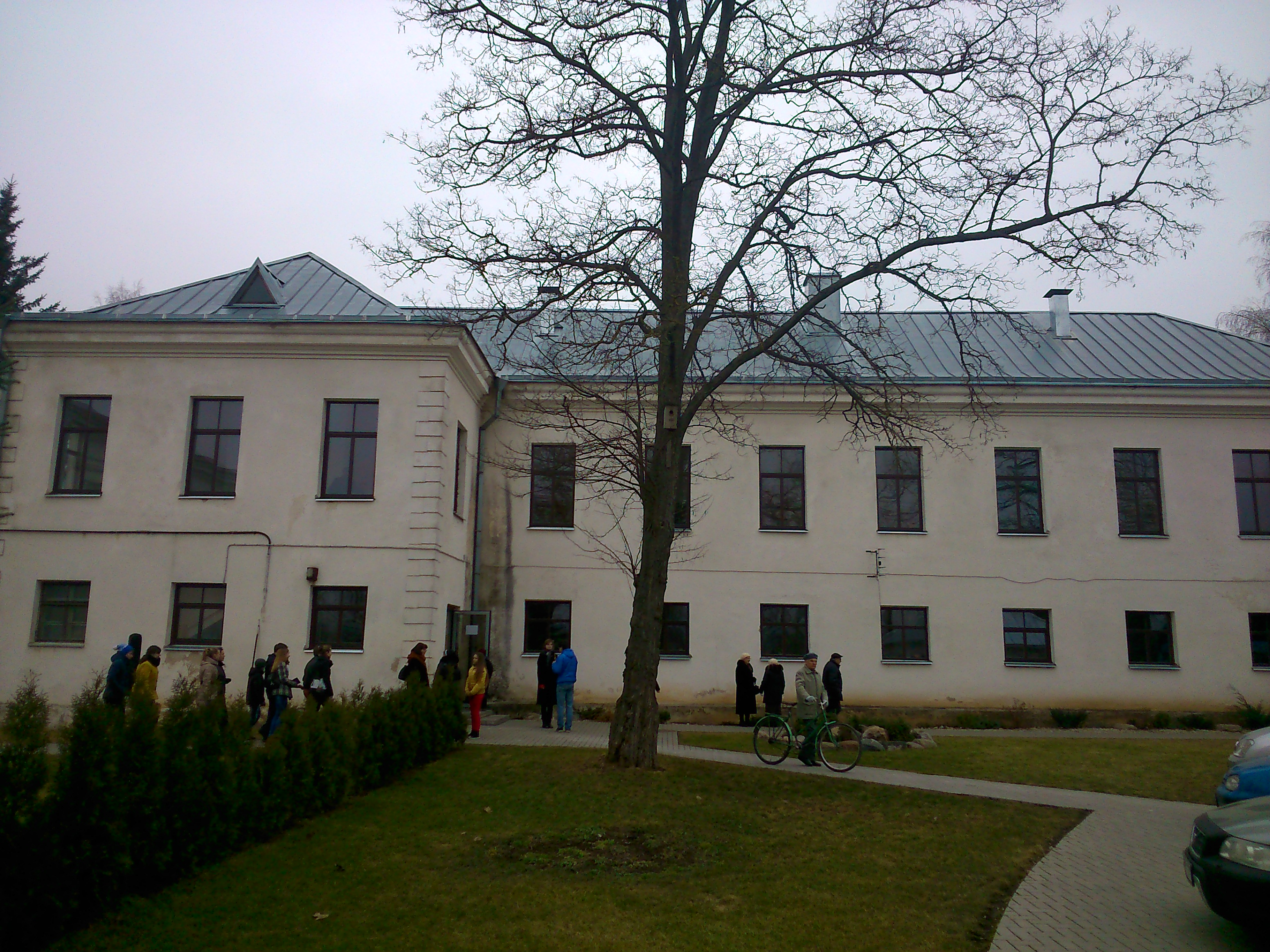 Jonavos parapijos namai